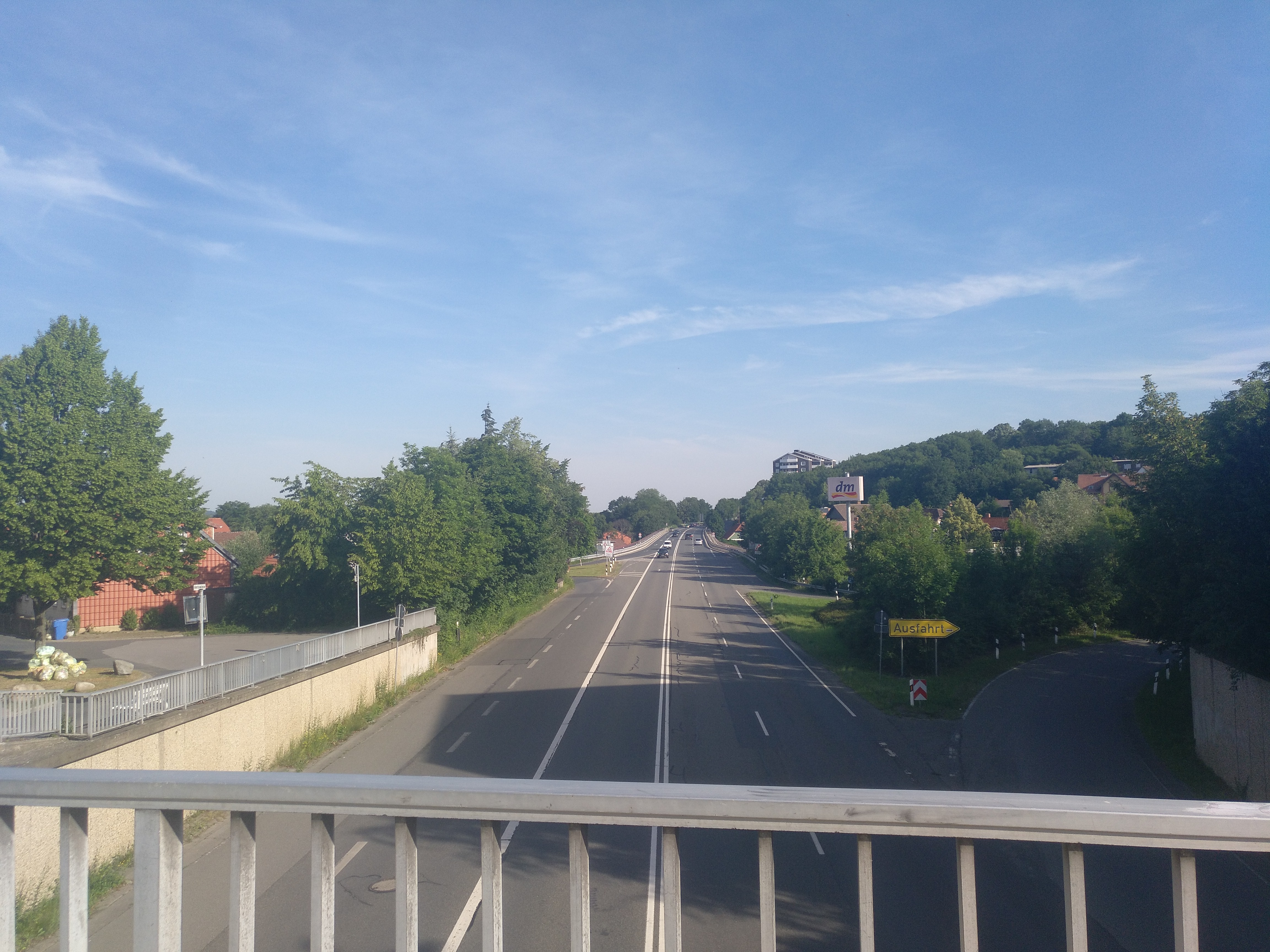 Blick von der Bundesstraße 4 in Richtung Norden und Abfahrt Bad Harzburg-Bahnhof mit Hornberg rechts im Hintergrund, 25. Juni 2019.